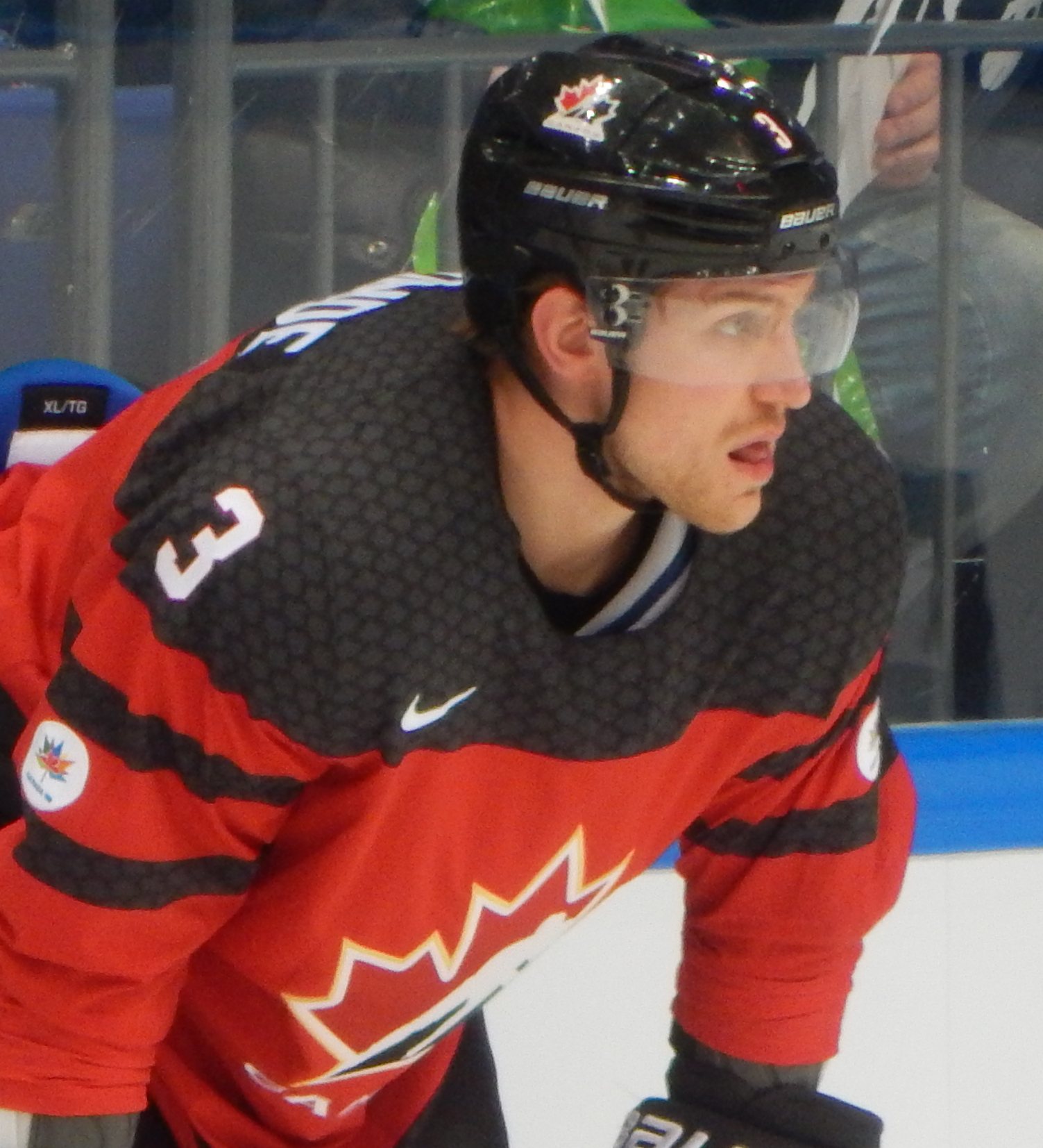 Кубок Первого Канала 2017, матч Чехия - Канада (15 декабря 2017) 3 LALONDE,Shawn